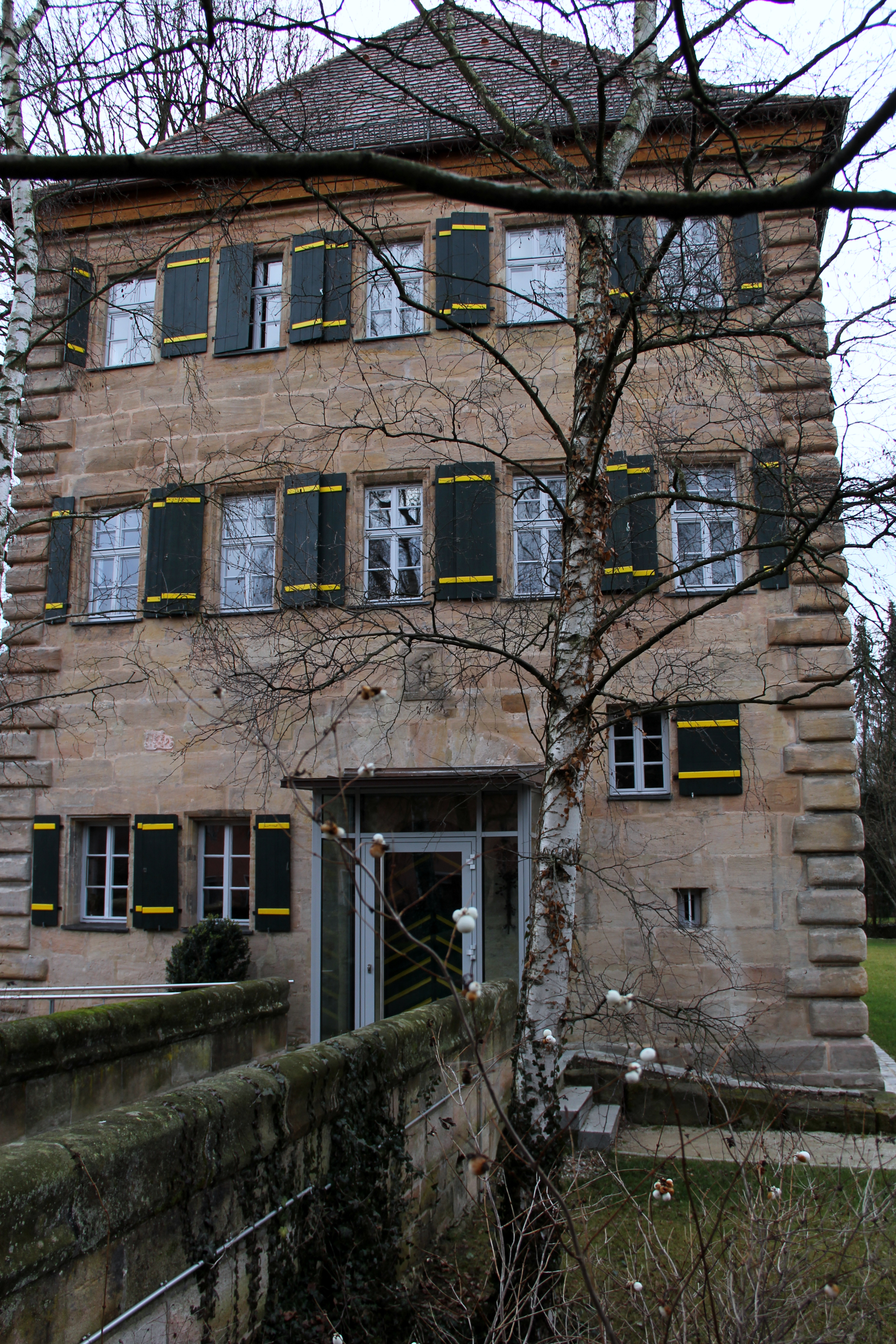 Zeidlerschloss, Blickrichtung von Süden nach Norden